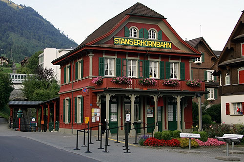 Stans: Talstation der Stanserhornbahn